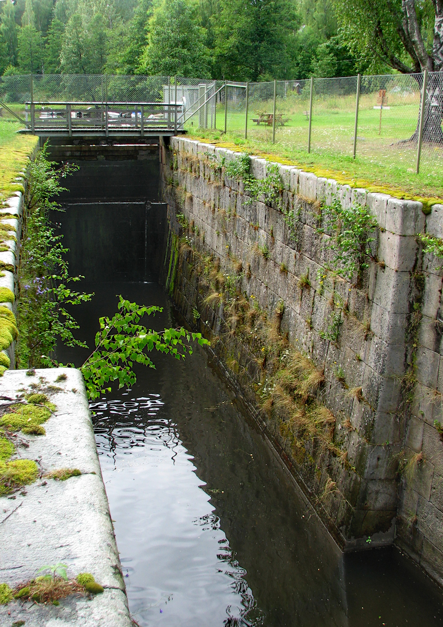 Tamms canal lock-chamber at Näsviken, Sweden